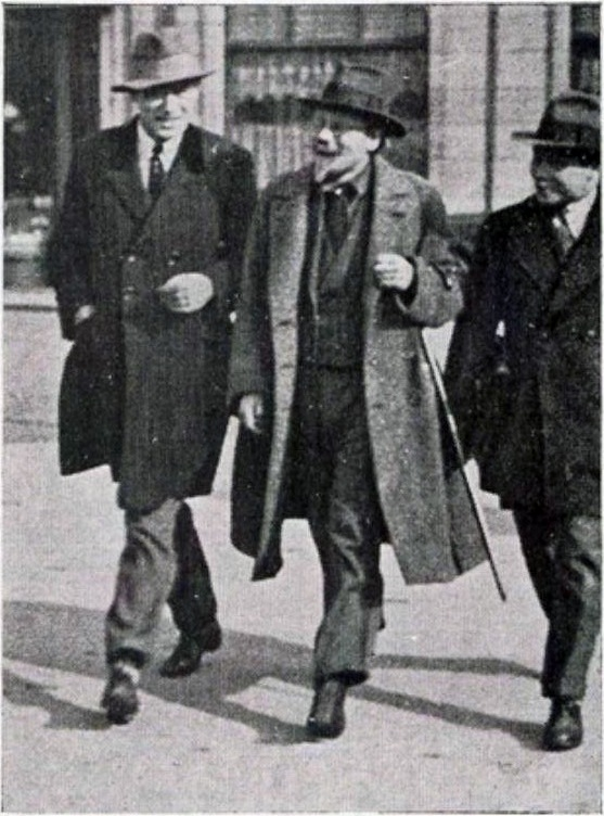 Ernst Michel, Erich Wichman, H.A. Sinclair de Rochemont. Afkomstig uit: Op de Hoogte (februari 1929): p. 41.